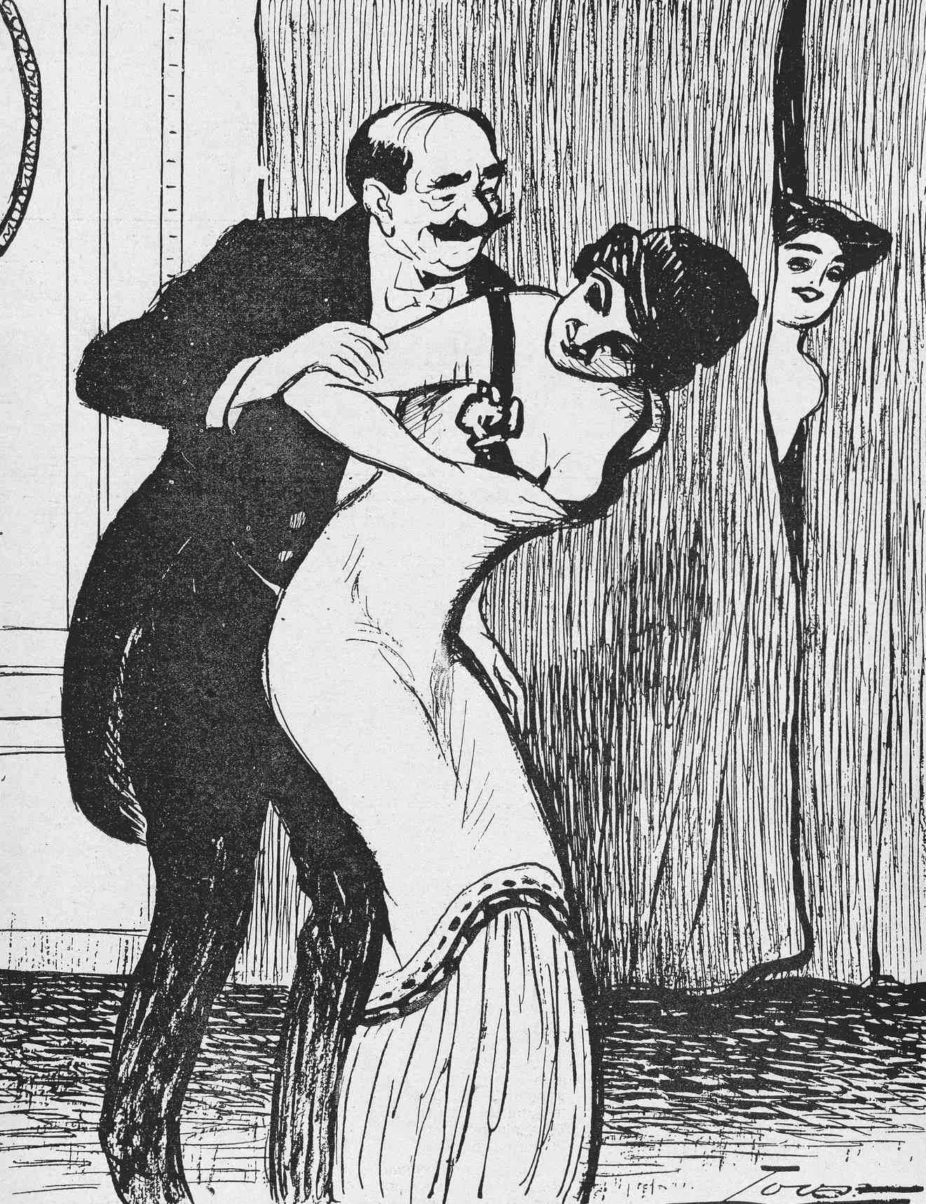 Oportunidad.